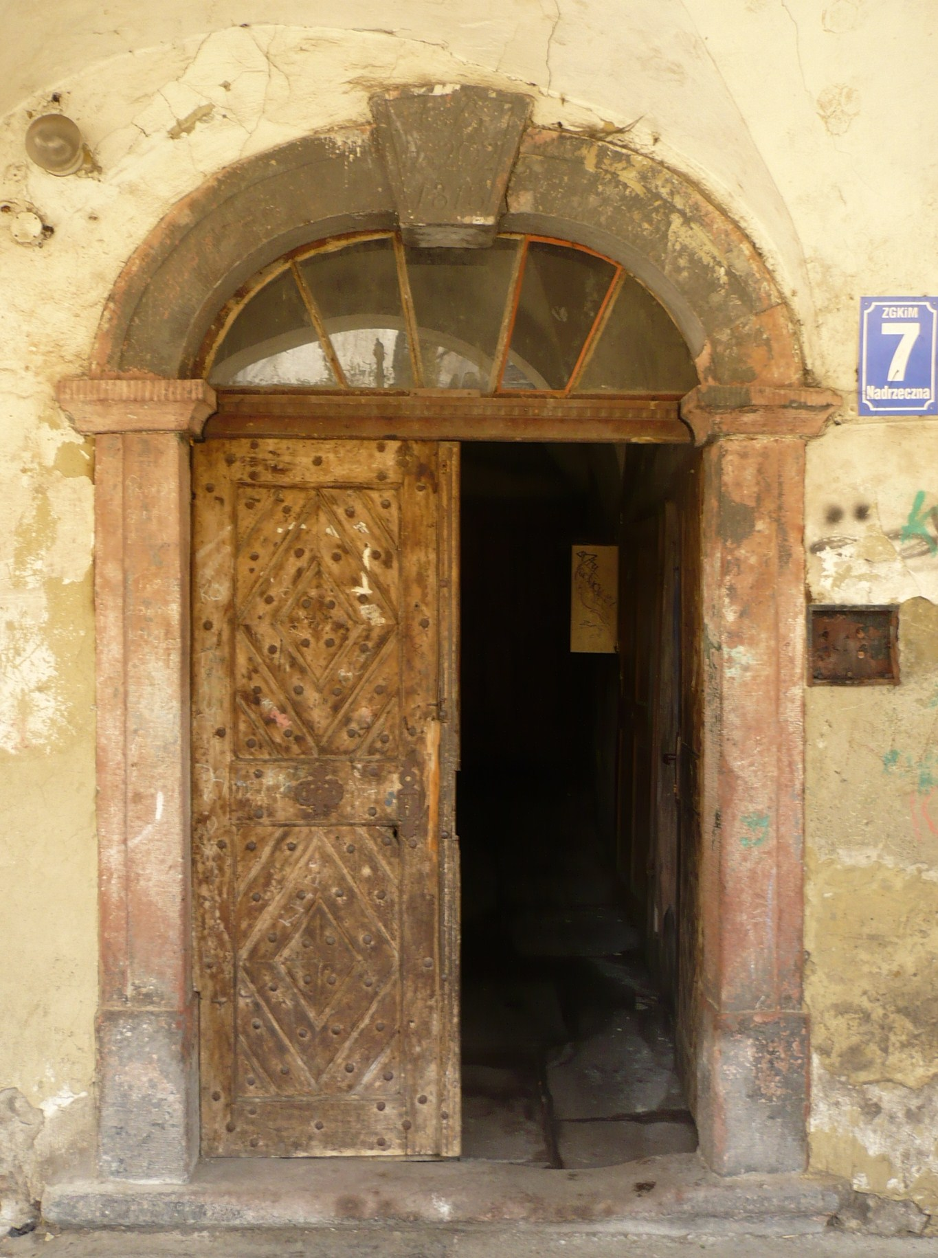 Nowa Ruda, ul. Nadrzeczna 7 - dom tkaczy, brama (zabytek nr A/927/1336/WŁ z 7.05.1991